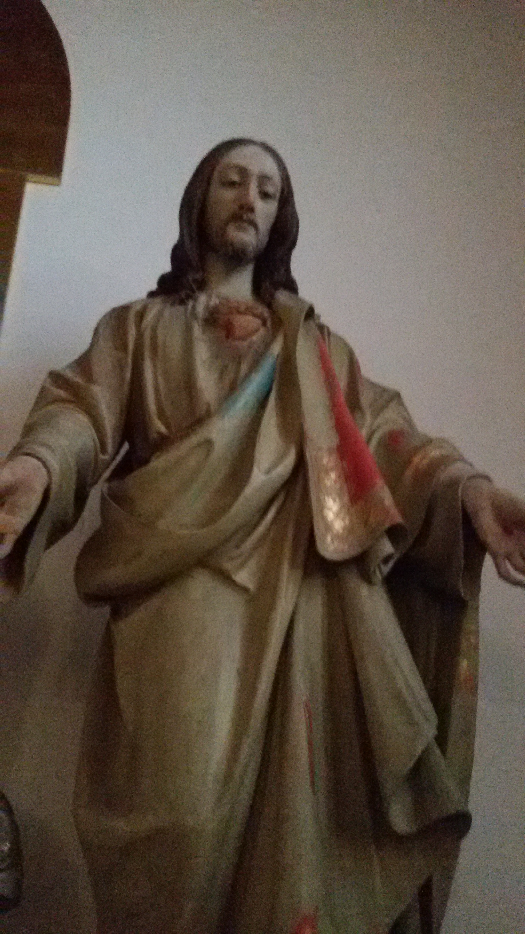 Chiesa di Santa Cristina Quinto di Treviso